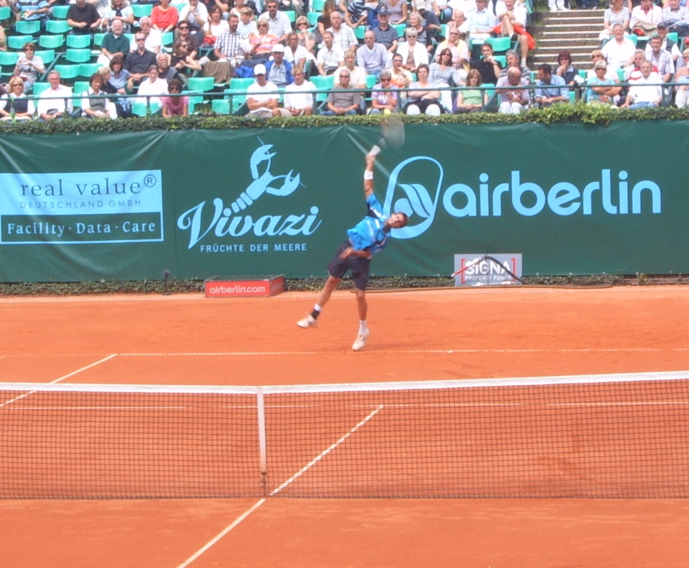 Marcel Granollers beim Aufschlag - Match gegen Evgeny Korolev in Düsseldorf.